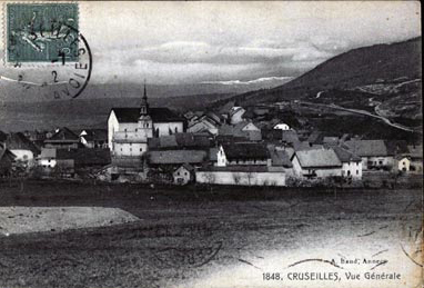 Vue de Cruseilles